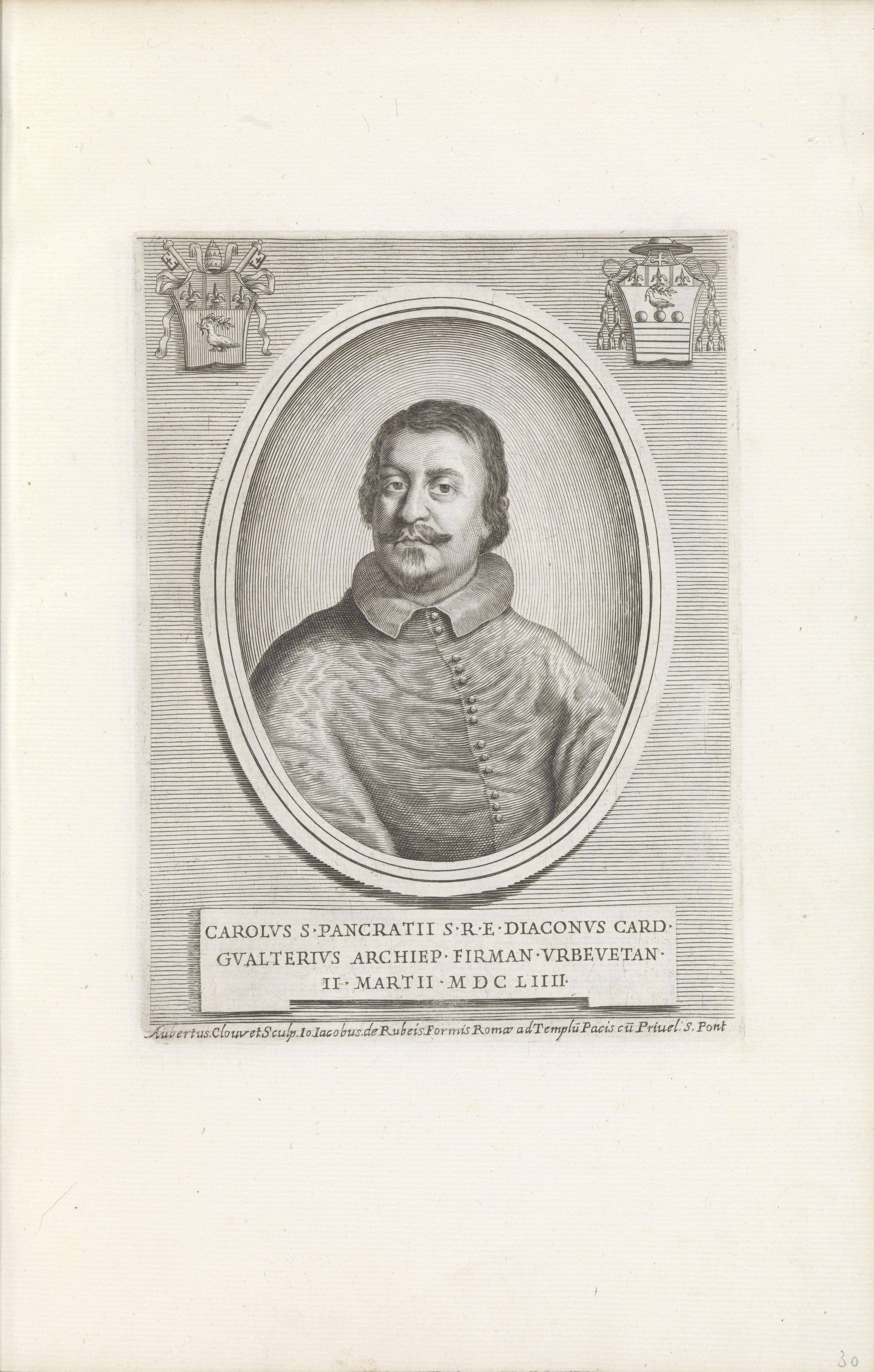 IdentificatieTitel(s): Portret van kardinaal Carlo GualterioEffigies Nomina et Cognomina S.D.N. Alexandri Papae VII et RR. DD. SRE. Cardd (...). (serietitel)Objecttype: prent albumblad Objectnummer: RP-P-1991-17-30Catalogusreferentie: Hollstein Dutch 8Omschrijving: Portret van kardinaal Carlo Gualterio. Linksboven het wapen van paus Innocentius X en rechtsboven het wapen van Gualterio. Onderaan een onderschrift in het Latijn. De prent maakt deel uit van een album.VervaardigingVervaardiger: prentmaker: Albertus Clouwet (vermeld op object)uitgever: Giovanni Giacomo de'Rossi (vermeld op object)verlener van privilege: Alexander VII (vermeld op object)Plaats vervaardiging: RomeDatering: 1658Fysieke kenmerken: gravureMateriaal: papier Techniek: graveren (drukprocedé)Afmetingen: plaatrand: h 195 mm × b 145 mmOnderwerpWat: cardinalWie: Carlo GualterioVerwerving en rechtenCredit line: Aankoop uit het F.G. Waller-FondsVerwerving: aankoop 1991Copyright: Publiek domein